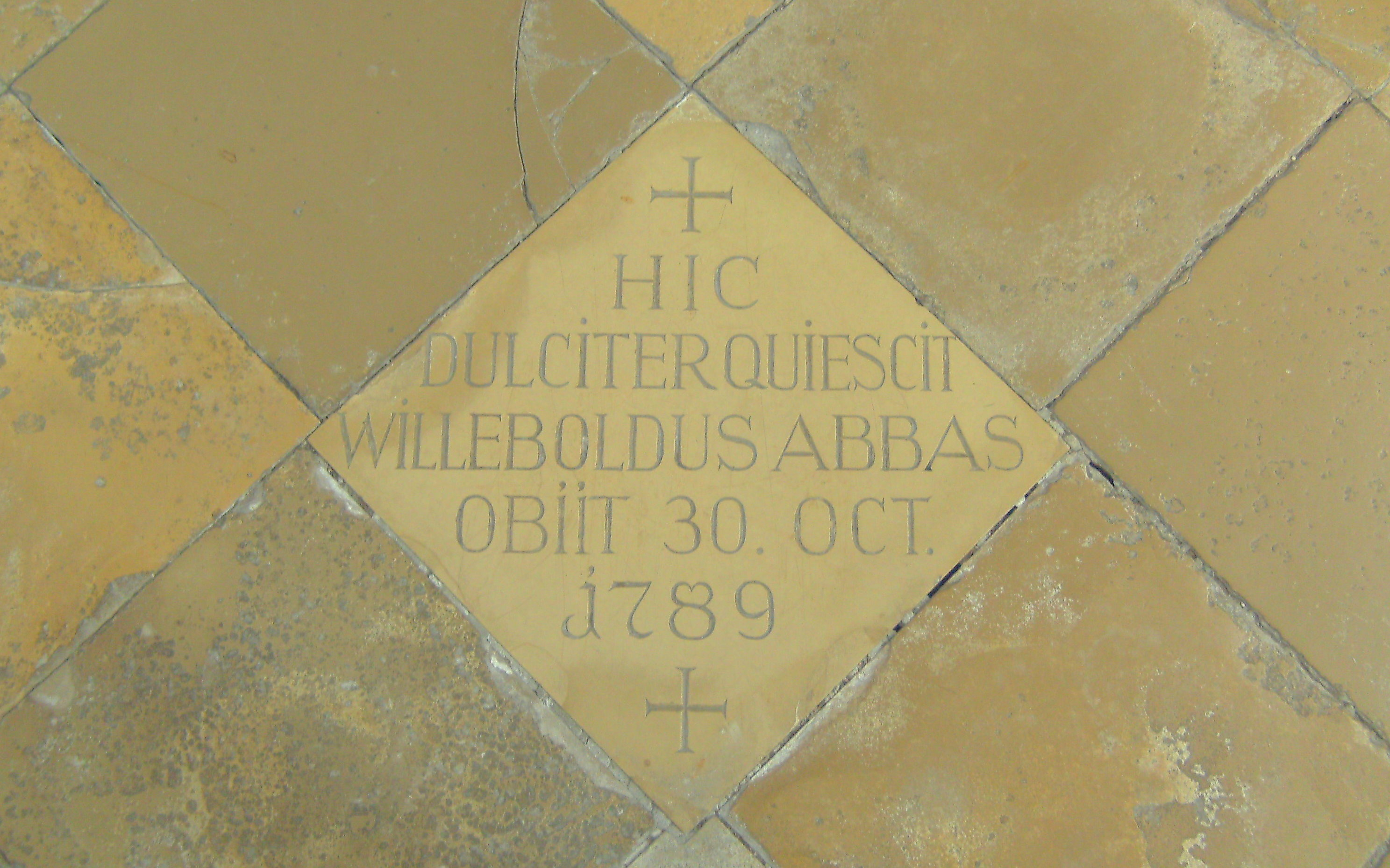 Grabplatte von Abt Willebold Held in St. Verena Rot an der Rot.